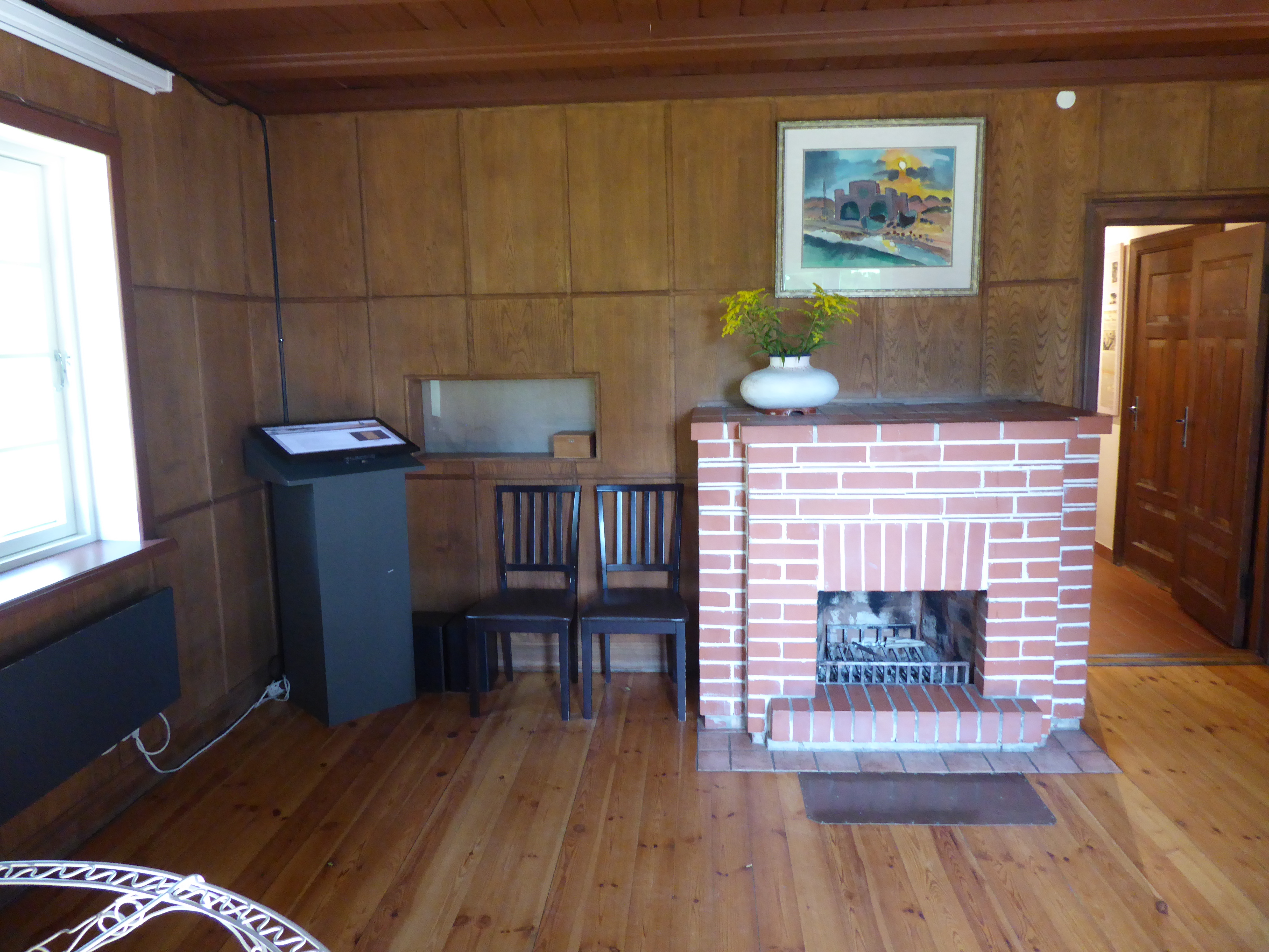 Nida Thomas-Mann-Gedenkstätte